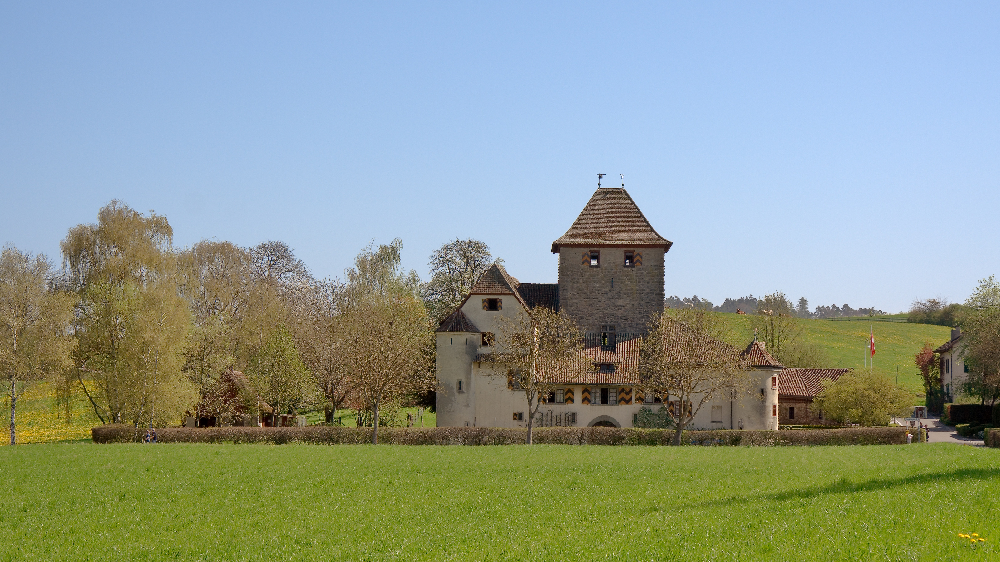 Schloss Hegi in Winterthur, Schweiz